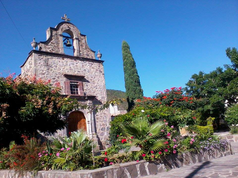 La Capilla de Ajijic, en la plaza principal